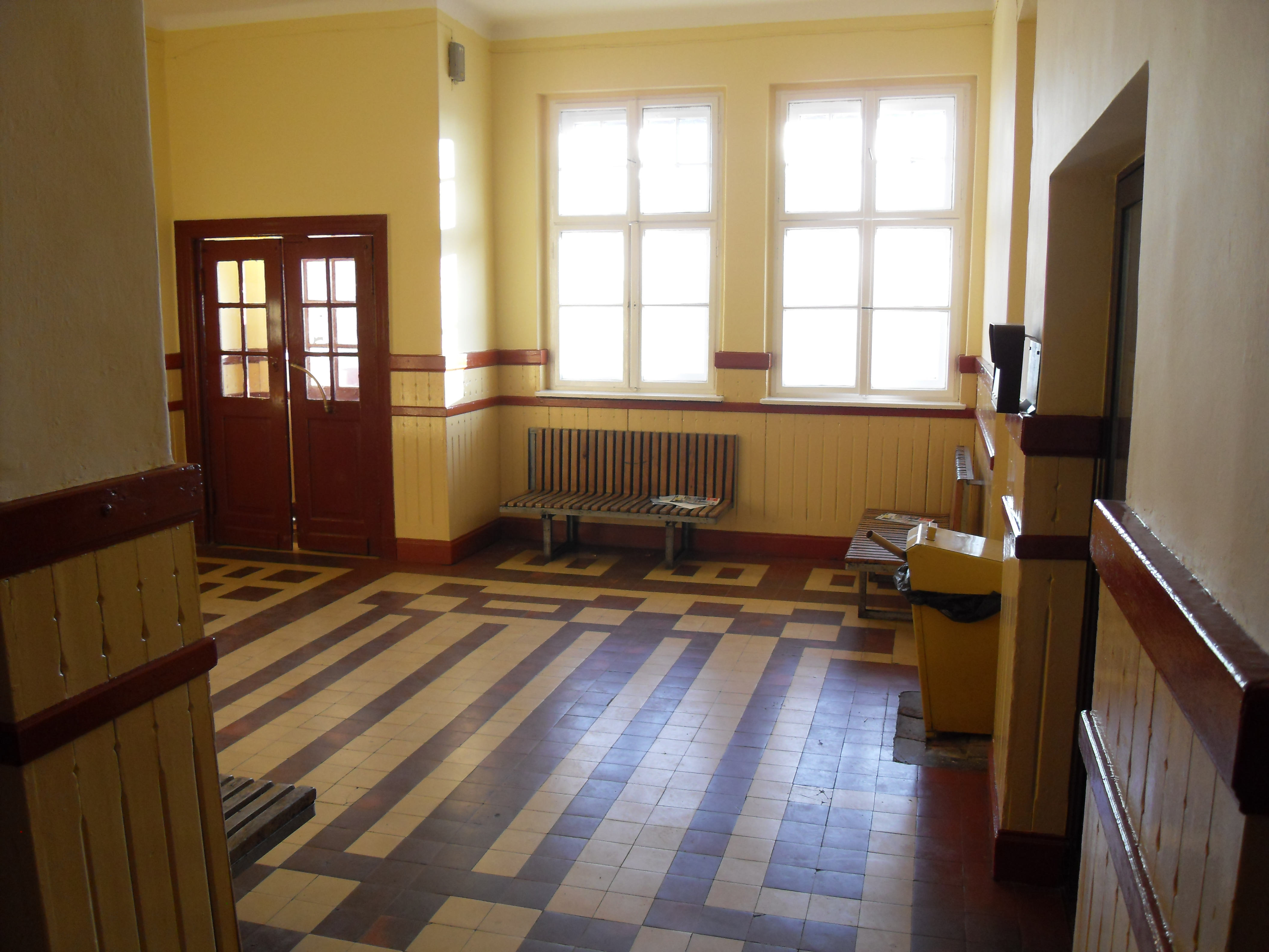 Stacja Gdańsk Osowa, poczekalnia.